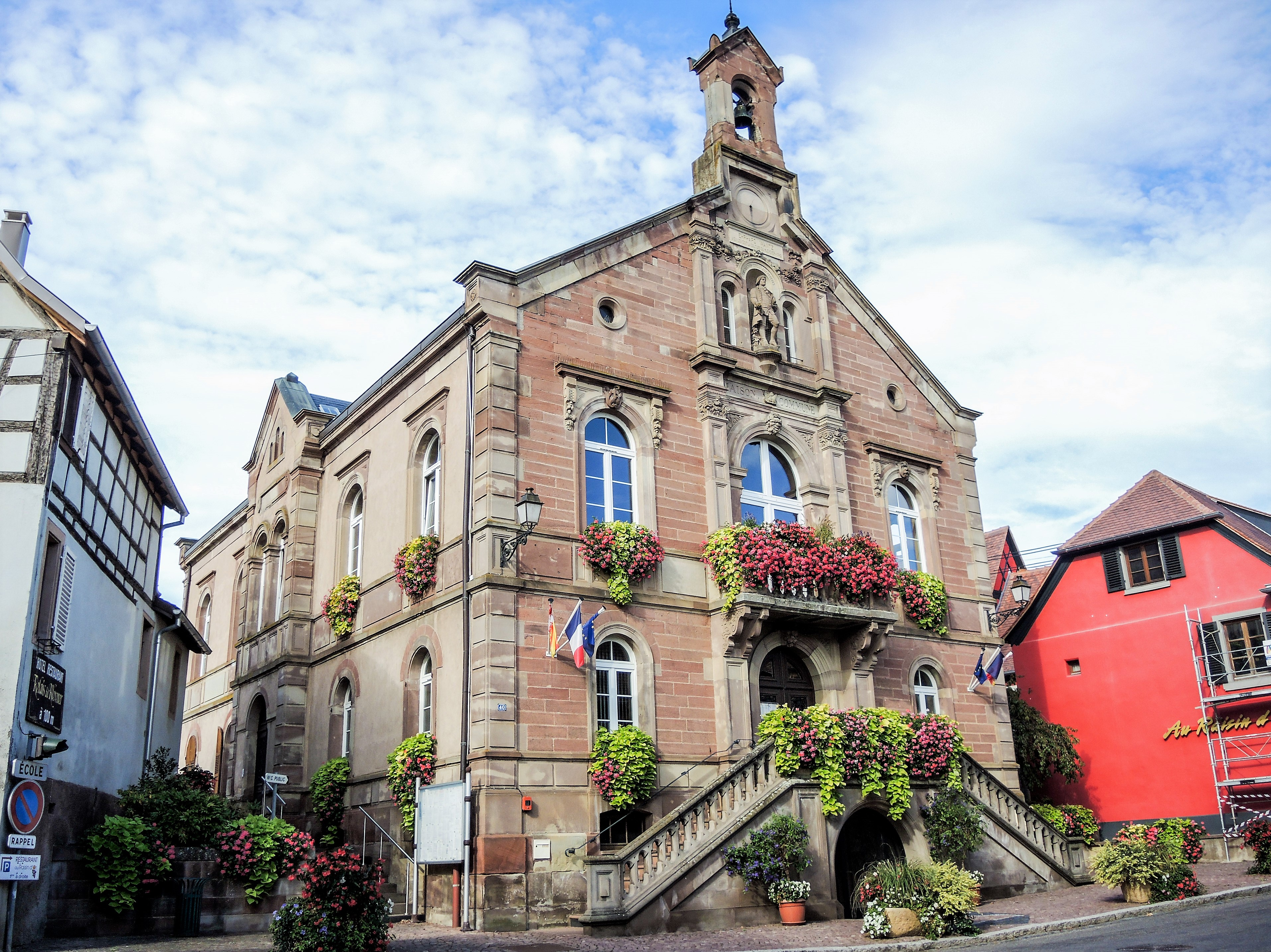 Mairie du village de Heiligenstein. Bas-Rhin.